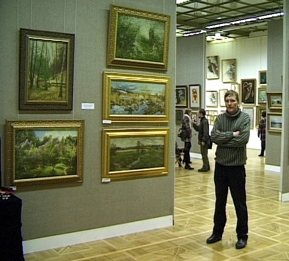 Е. А. Богатов на выставке в Центральном Доме художника